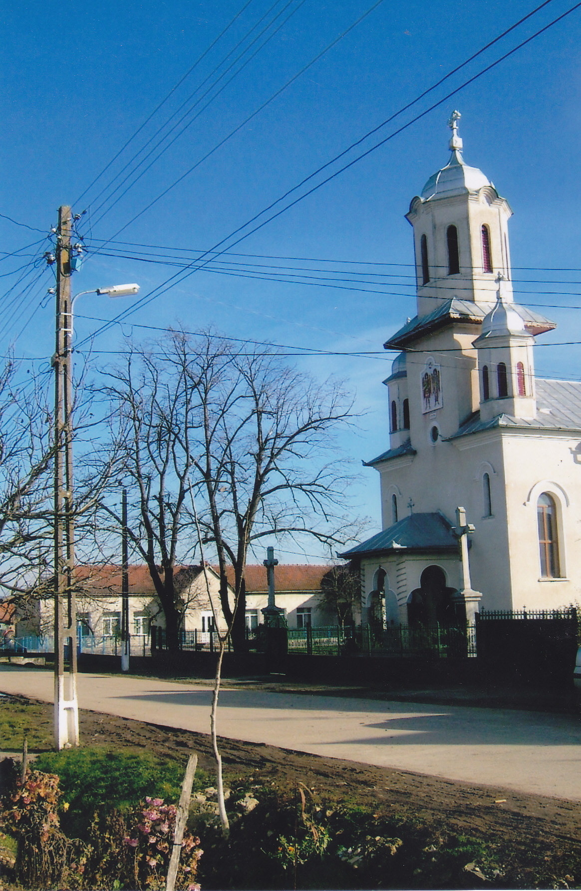 Biserică Ortodoxă nouă, finalizată la 1956, fotografia din 2014